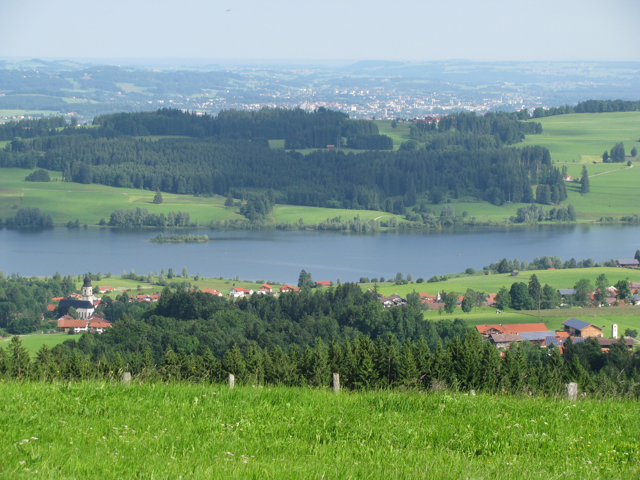 Petersthal (etwas durch Wald verdeckt) mit Pfarrkirche St. Peter und Paul, Rottachsee, im Hintergrund Kempten im Allgäu, von der Ellegg-Höhe aus gesehen